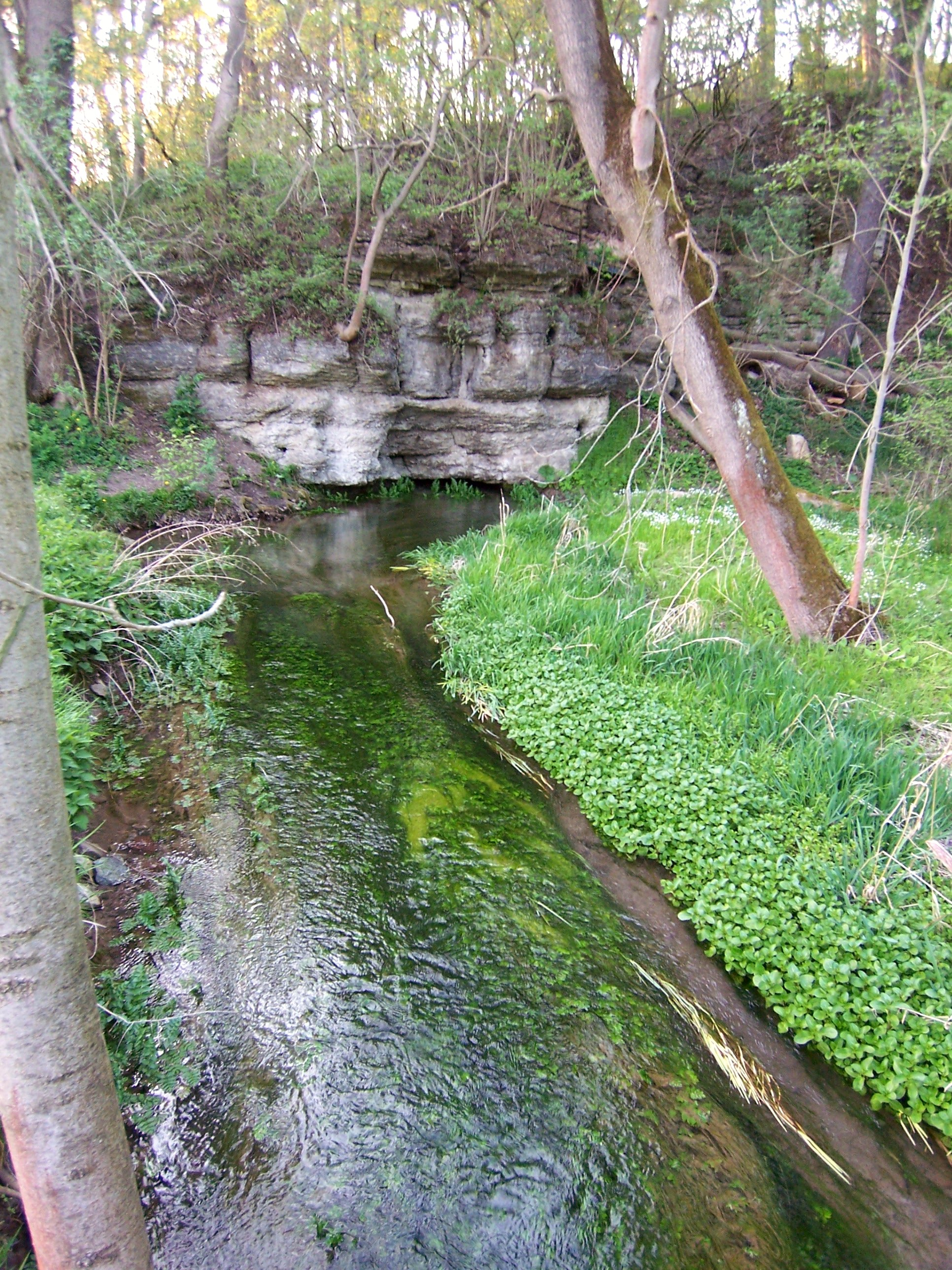 die Gera kehrt aus dem Karstuntergrund zurück